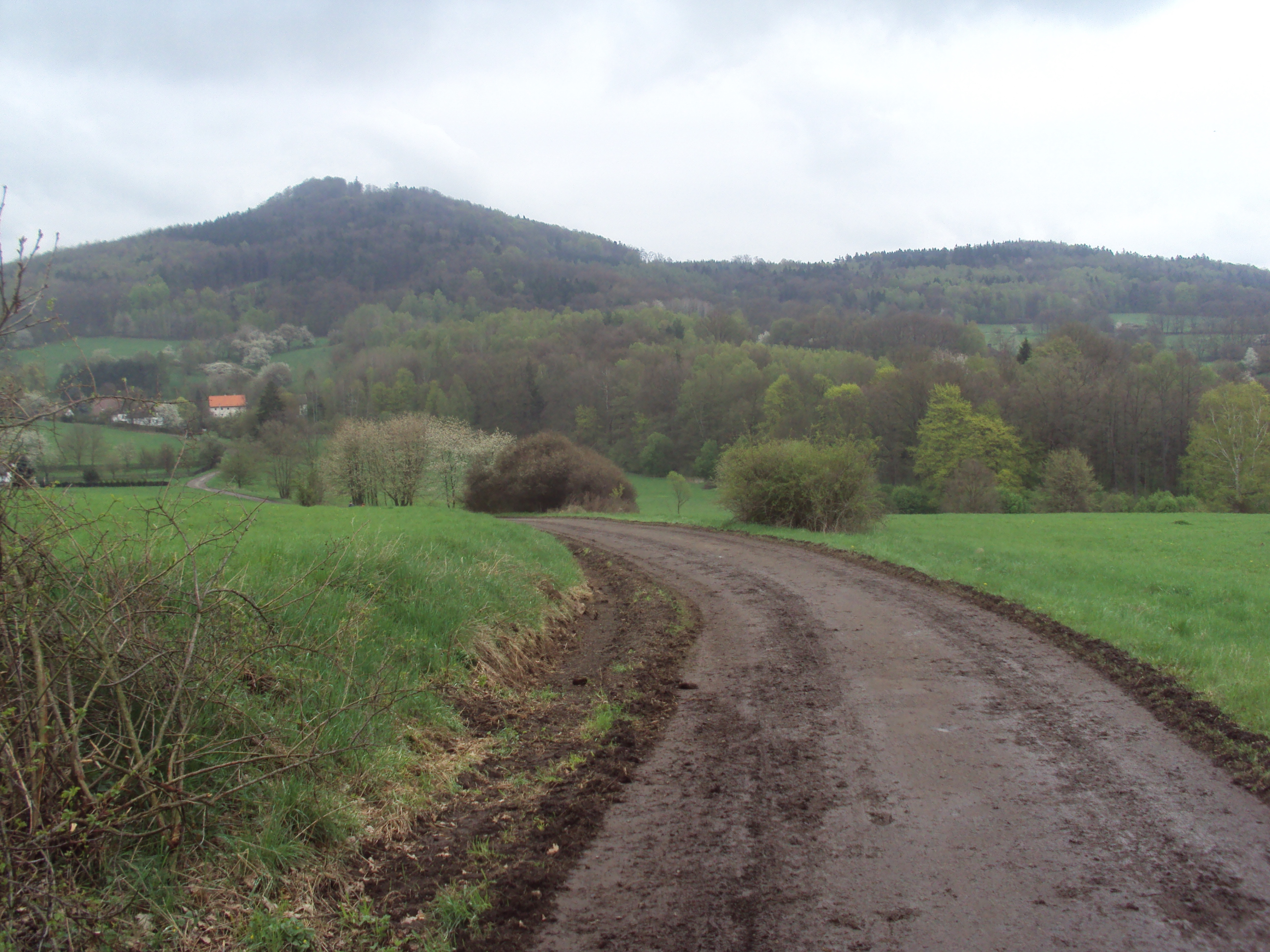 Obec Radeč u Žandova zdáli, vlevo Radečský kopec 504 m., vpravo Stružnický vrch 432 m.